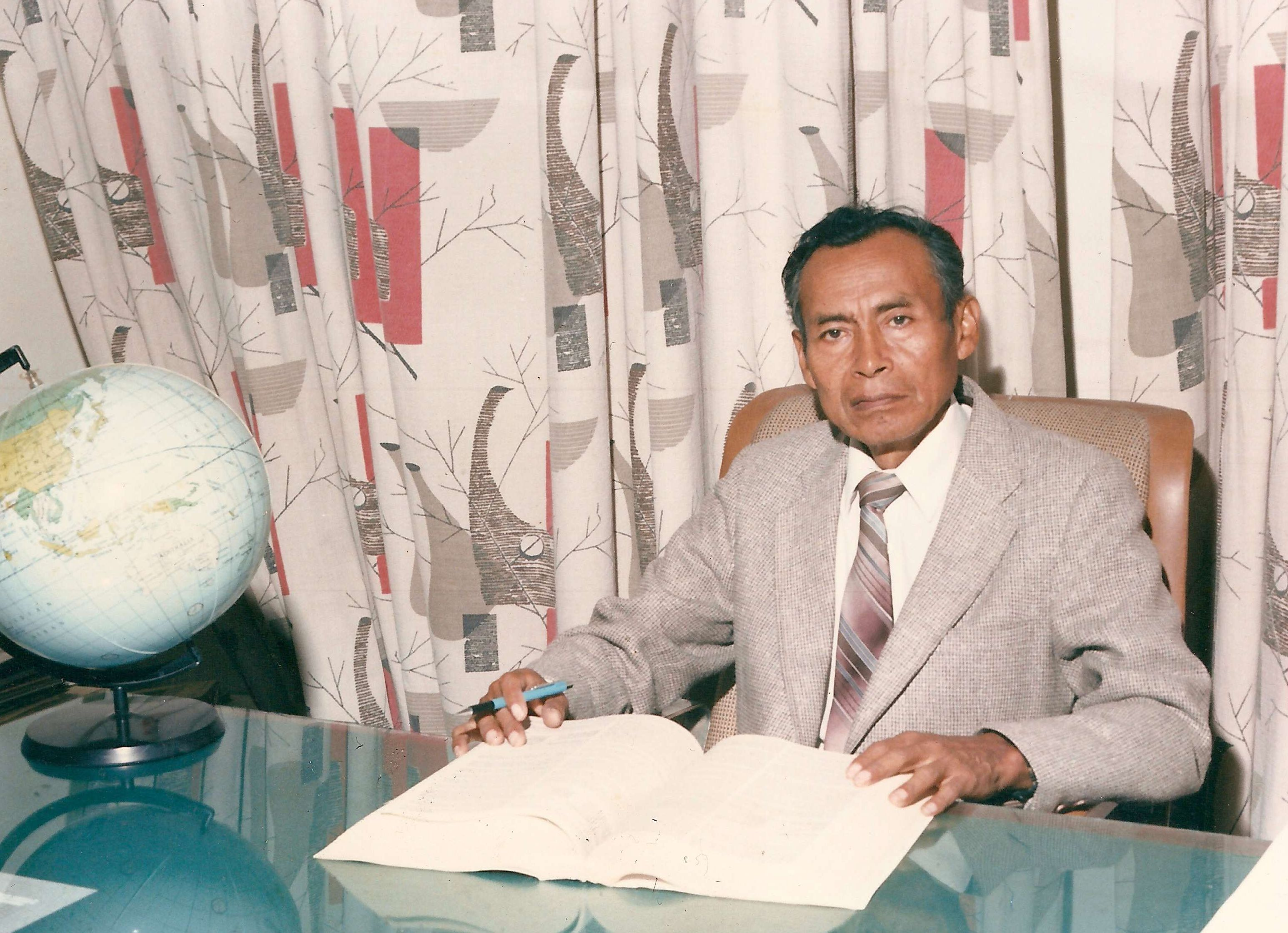 El Dr. Ruben Castillo Anchapuri, primer rector de la Universidad Union Incaica (Hoy Universidad Peruana Union).